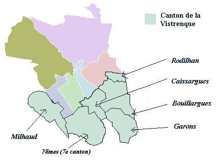 Le Canton de la Vistrenque Image personnelle